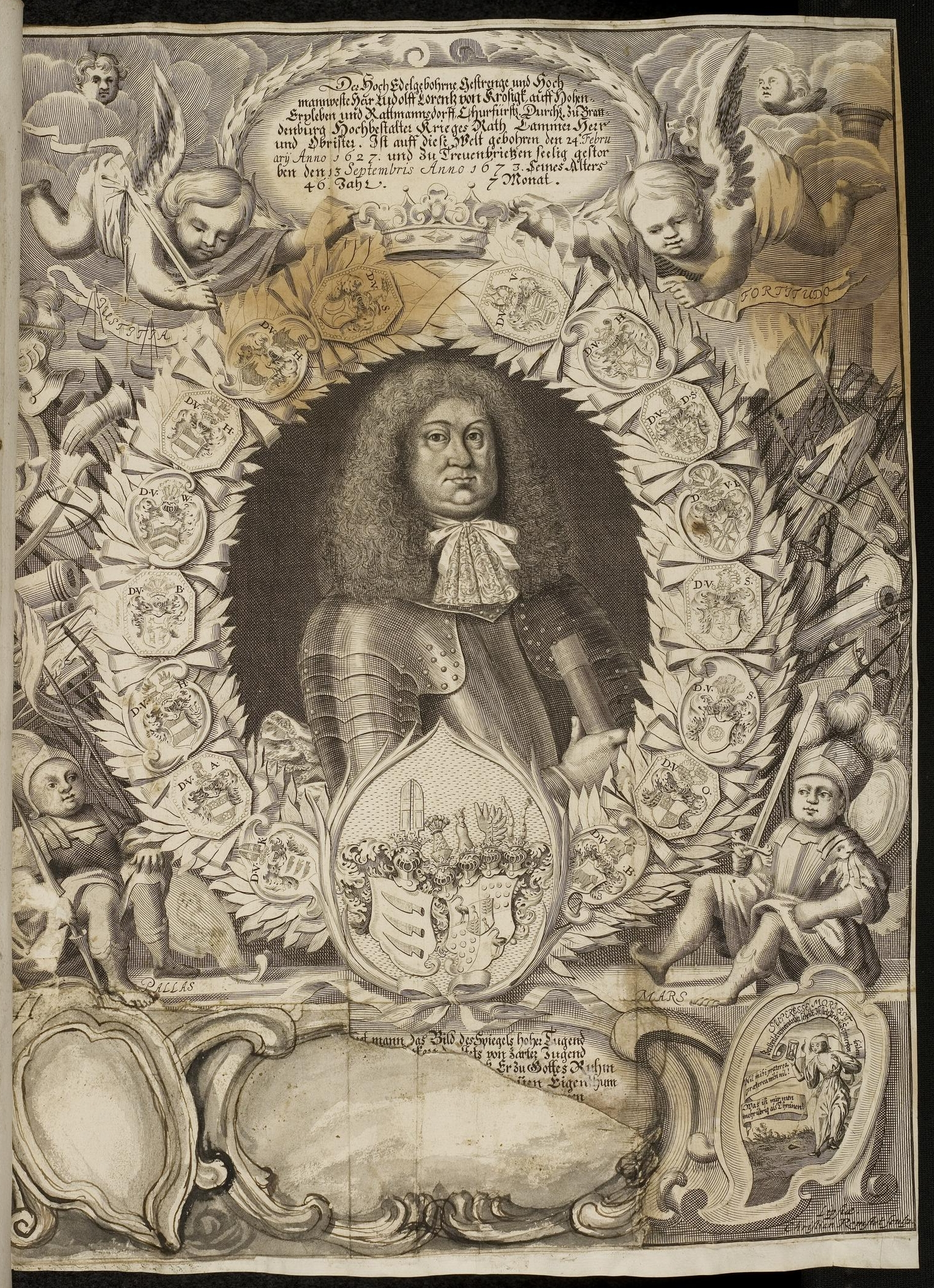 Grafik aus dem Klebeband Nr. 1 der Fürstlich Waldeckschen Hofbibliothek Arolsen Motiv: Ludolf Lorenz von Krosigk (* 4. Februar 1627; † 13. September 1673), Kriegsrat